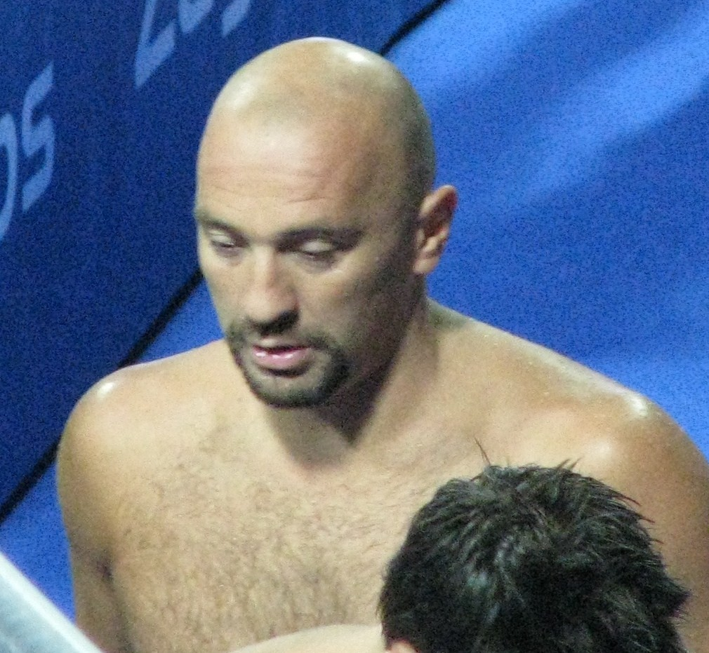 Samir Barač